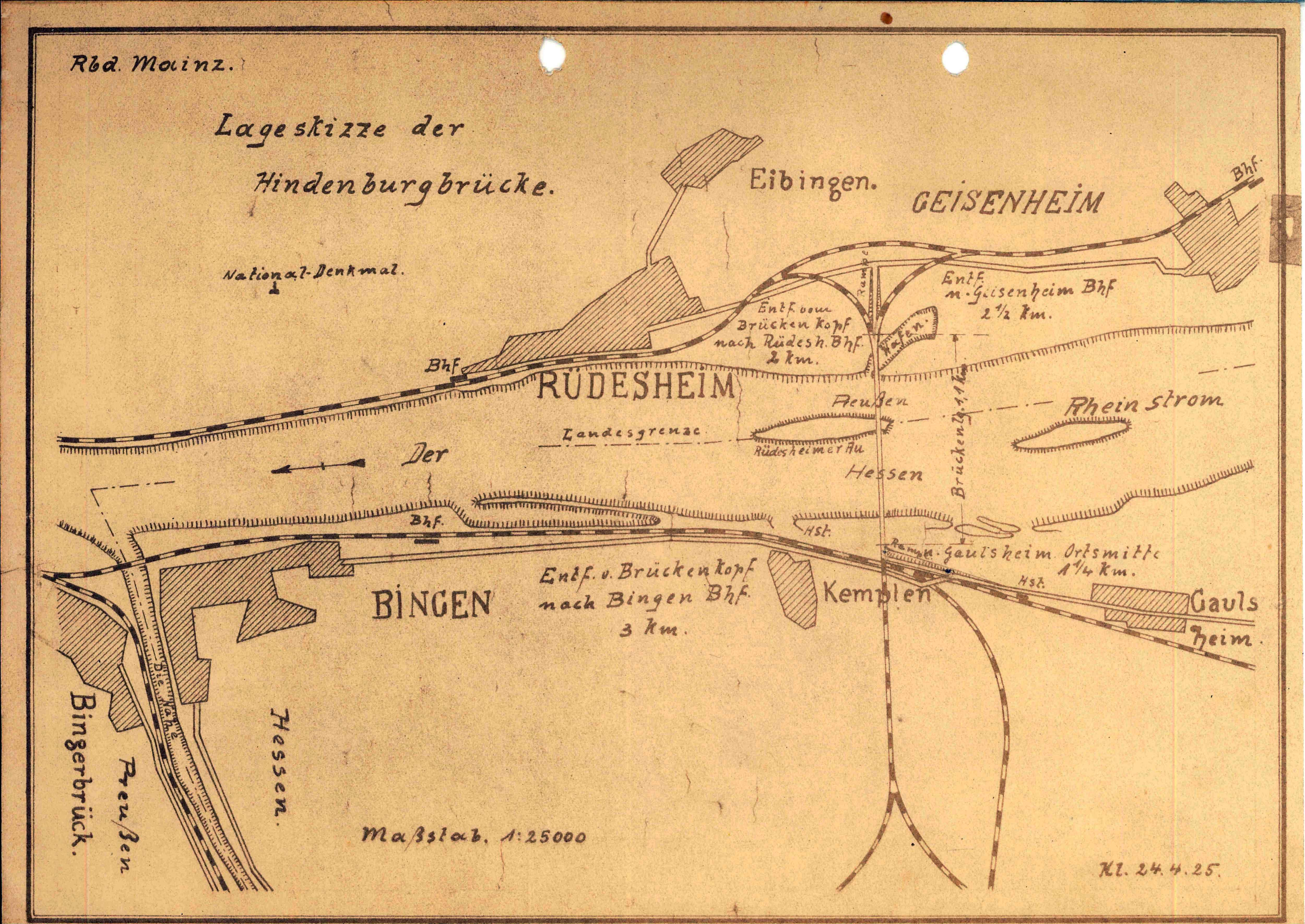 Lageskizze der Hindenburgbrücke, erstellt am 24.04.1925 in Mainz im Maßstab 1:25000 (Bingen, Rüdesheim, Geisenheim, Kempten, Preußen, Gaulsheim, Eibingen)